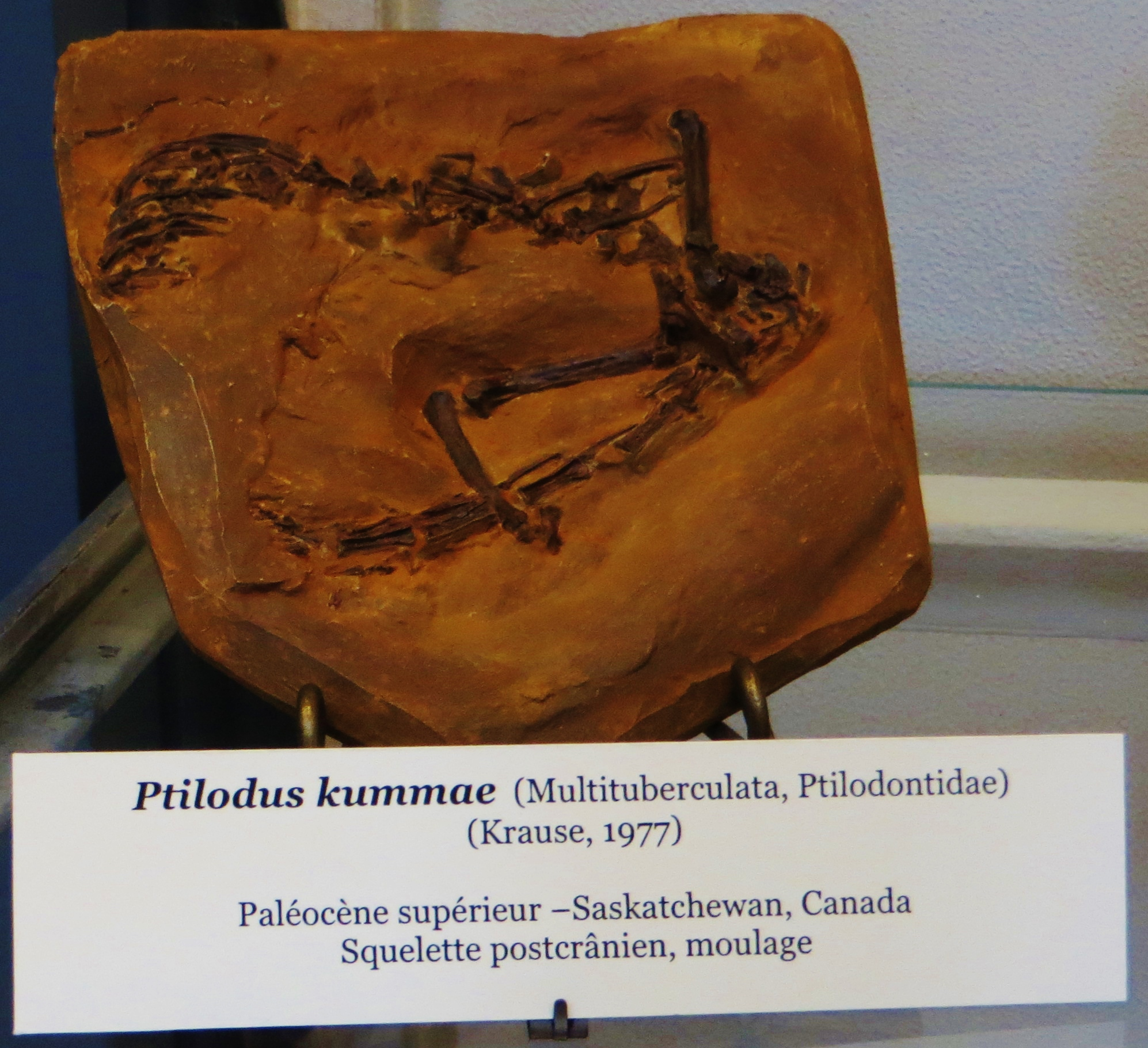 Fossil of Ptilodus, an extinct mammal - Took the photo at Musee d'Histoire Naturelle, Paris